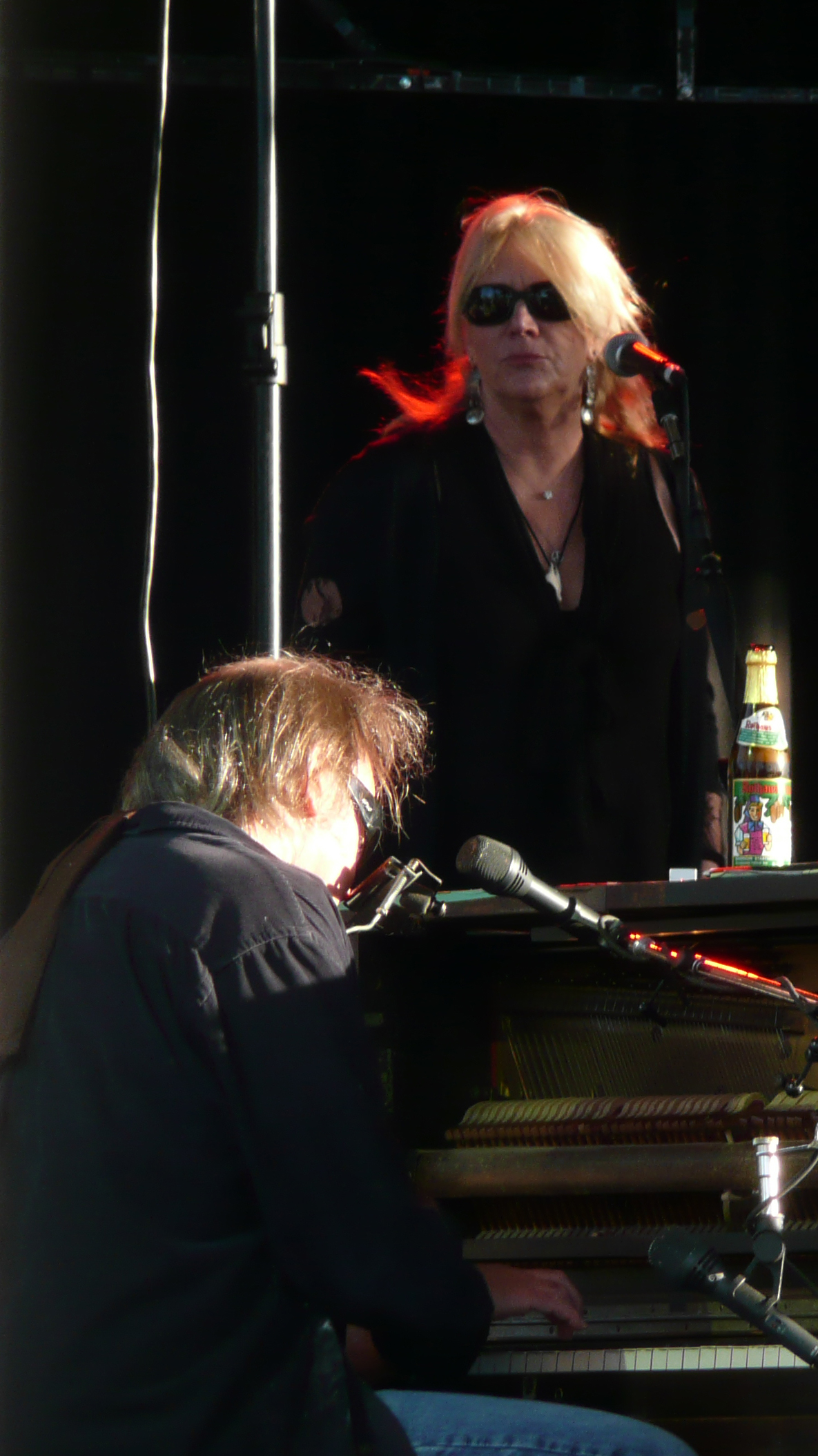 Pegi und Neil Young am 19. Juni 2009 am Kölner Tanzbrunnen